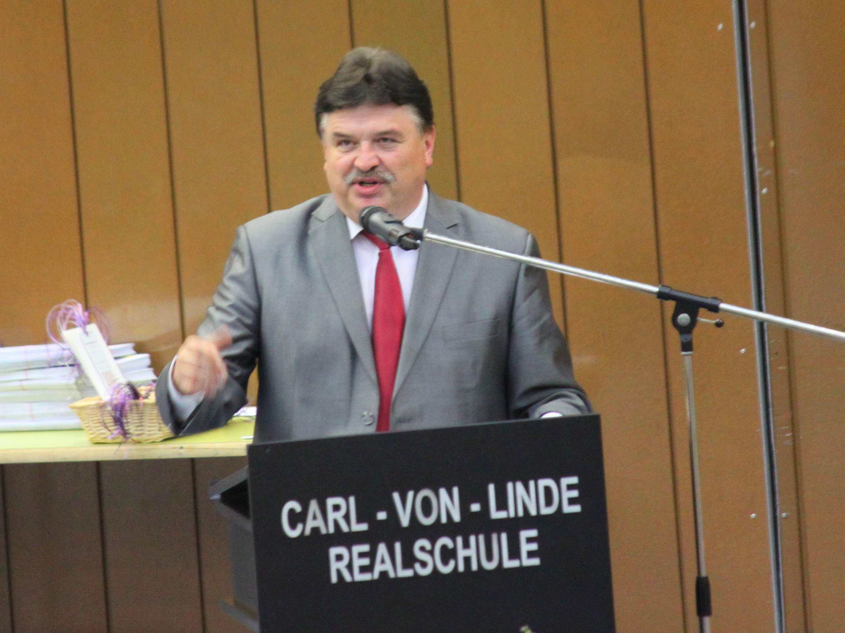 Klaus Peter Söllner, Landrat des Landkreises Kulmbach, bei Abschlussfeier Carl-von-Linde-Realschule 2013